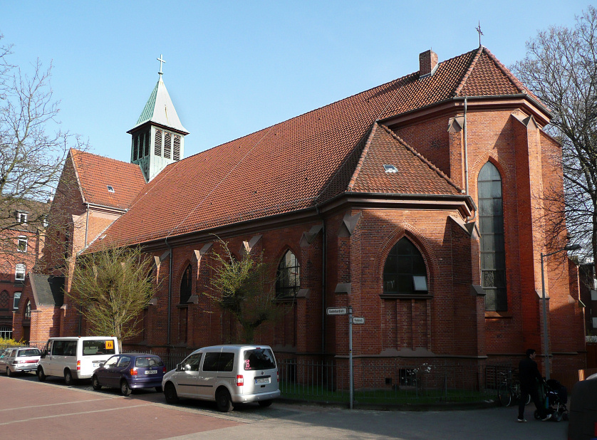 Godehardkirche Hannover. Das Gebäude war der erste nach Plänen von Christoph Hehl errichtete Kirchenbau im Gebiet des heutigen Hannovers. Zu dem katholischen Zentrum gehörten ein heute stark verändertes Pfarrhaus und ein nicht mehr vorhandenes Schulgebäude. Aufgrund der geringen finanziellen Mittel der Gemeinde fiel die neugotische, dreischiffige Staffelhalle bescheidener aus als bei anderen katholischen Kirchen der Zeit. Durch Bombenschäden gingen 1943 der achteckige Dachreiter und die hölzernen Kreuzrippengewölbe im Inneren verloren, die Außenmauern blieben jedoch erhalten. Beim der Wiederaufbau ab 1949/50 wurde das Innere verändert und das ehemalige Hauptportal durch einen Kapellen-Vorbau ersetzt. Die 1968 eingebaute Orgel durch die Firma Emil Hammer enthält Elemente ihrer Vorgängerin von 1954.